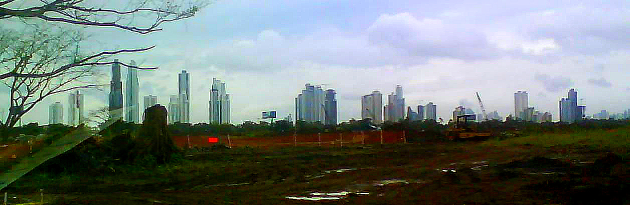 Rascacielos de Costa del Este, 2010